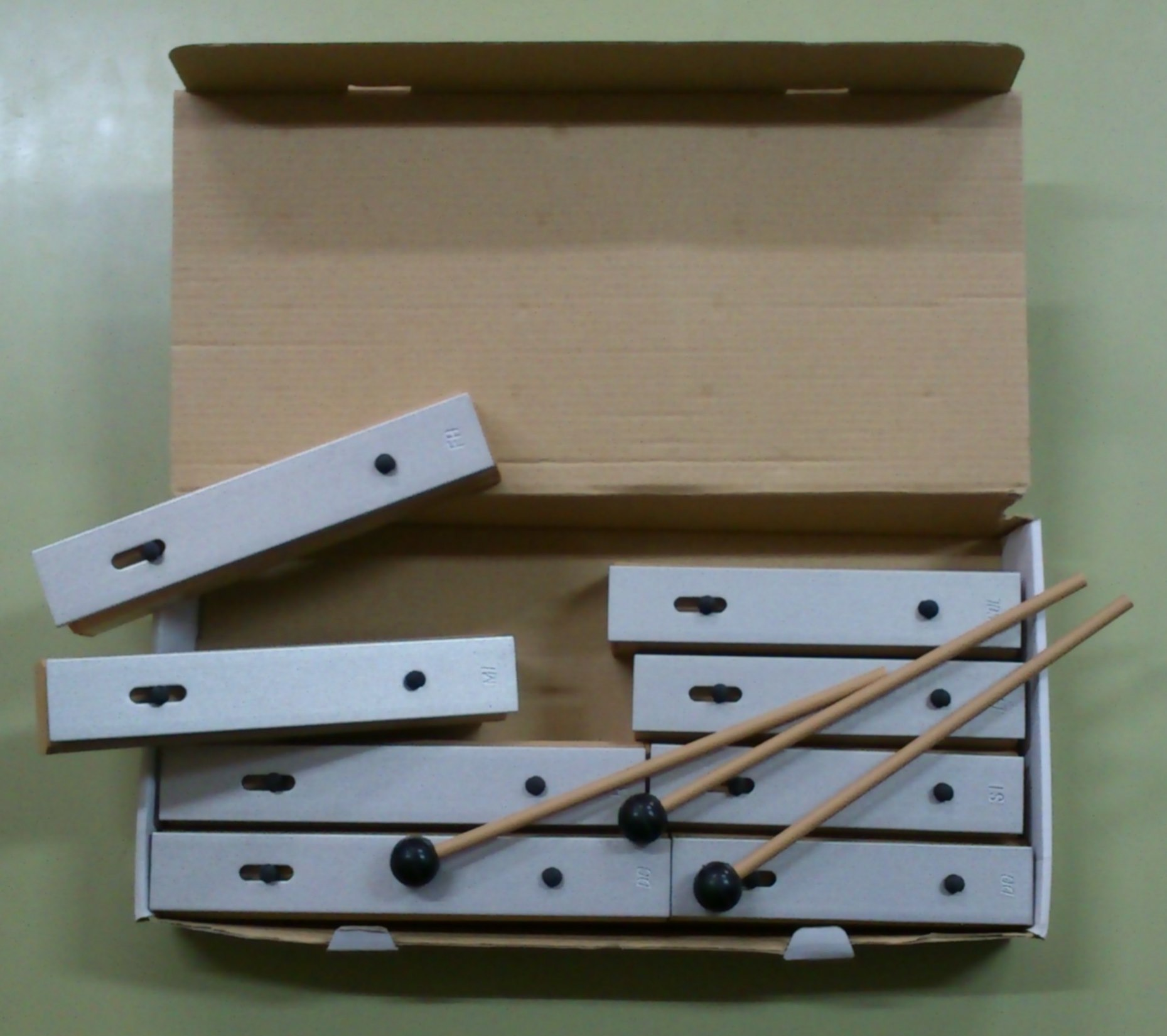 Placas de metalófono sueltas, conformando una escala de do mayor, para uso en la escuela.